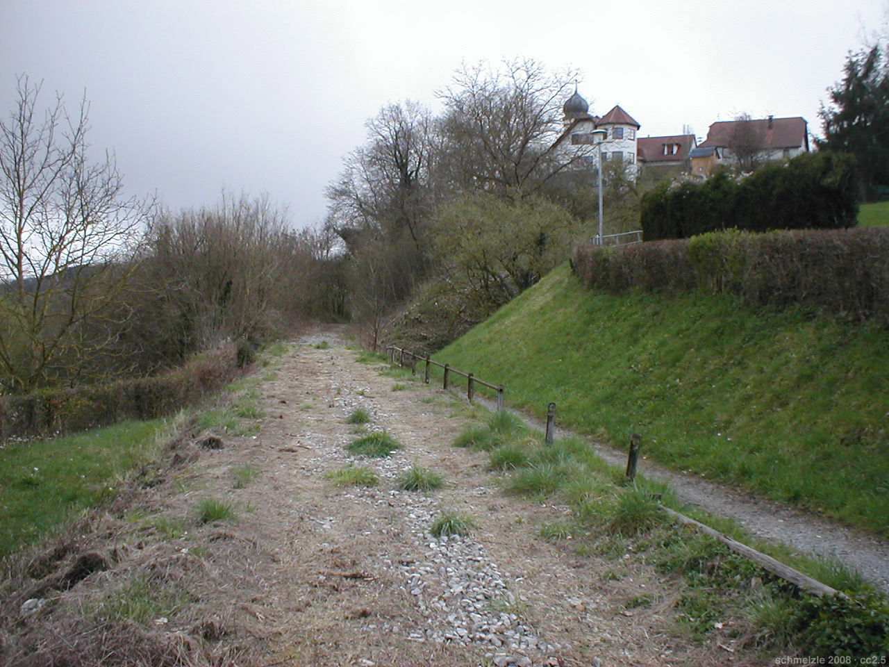 Ehemalige Trasse der Unteren Kochertalbahn bei Degmarn (Oedheim)